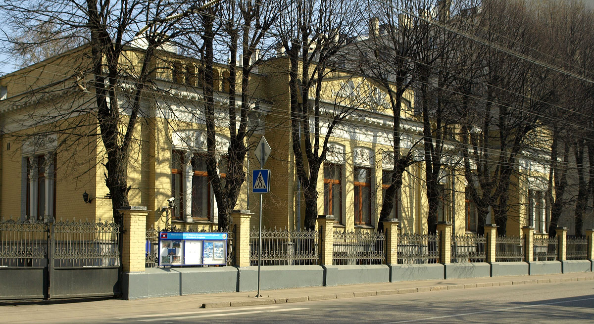 18, Malaya Nikitskaya Street, Moscow. Embassy of Laos